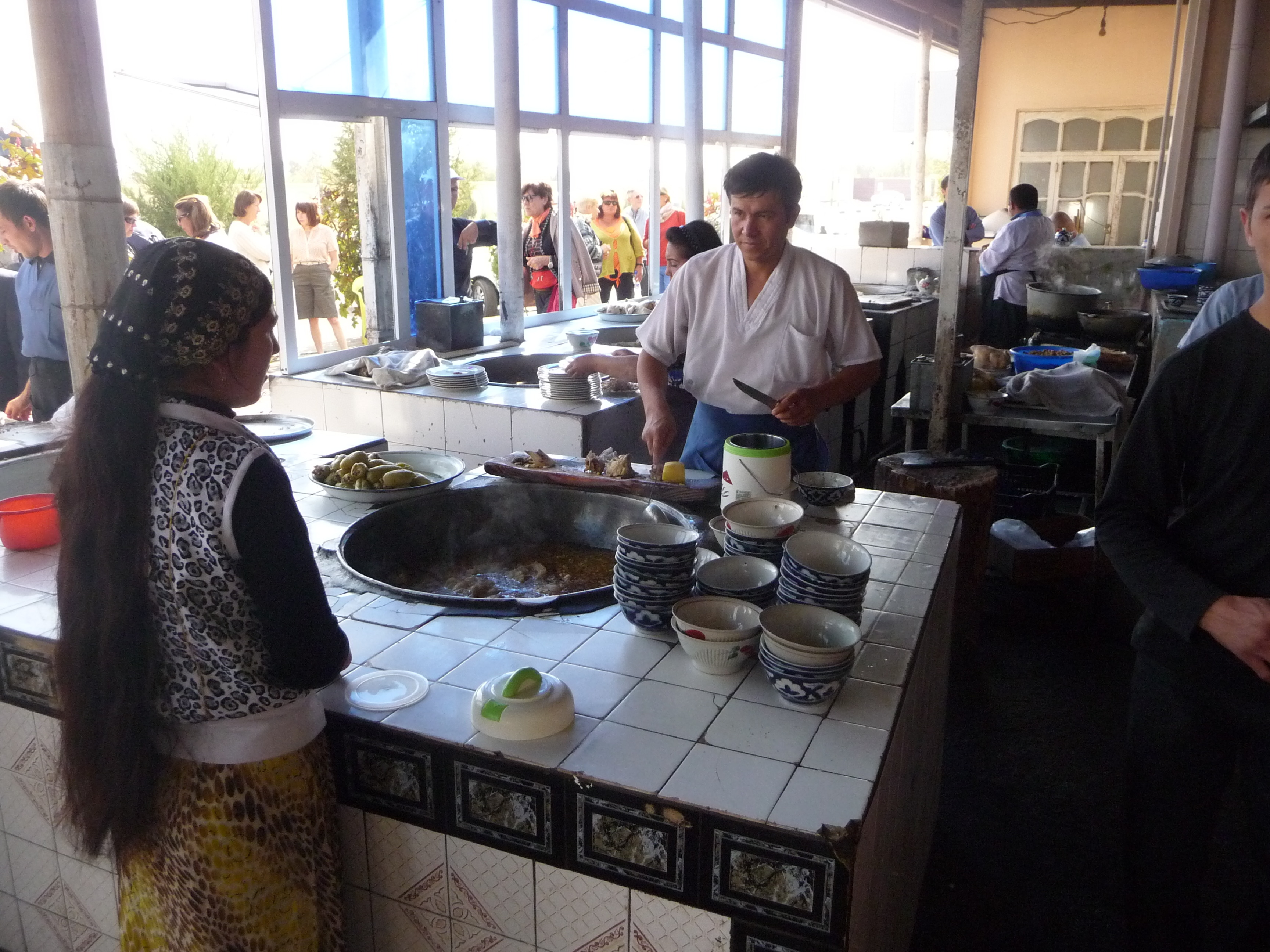 Questo è uno dei tanti autogril che abbiamo incontrato sulla strada da Bukhara a Samarcanda.